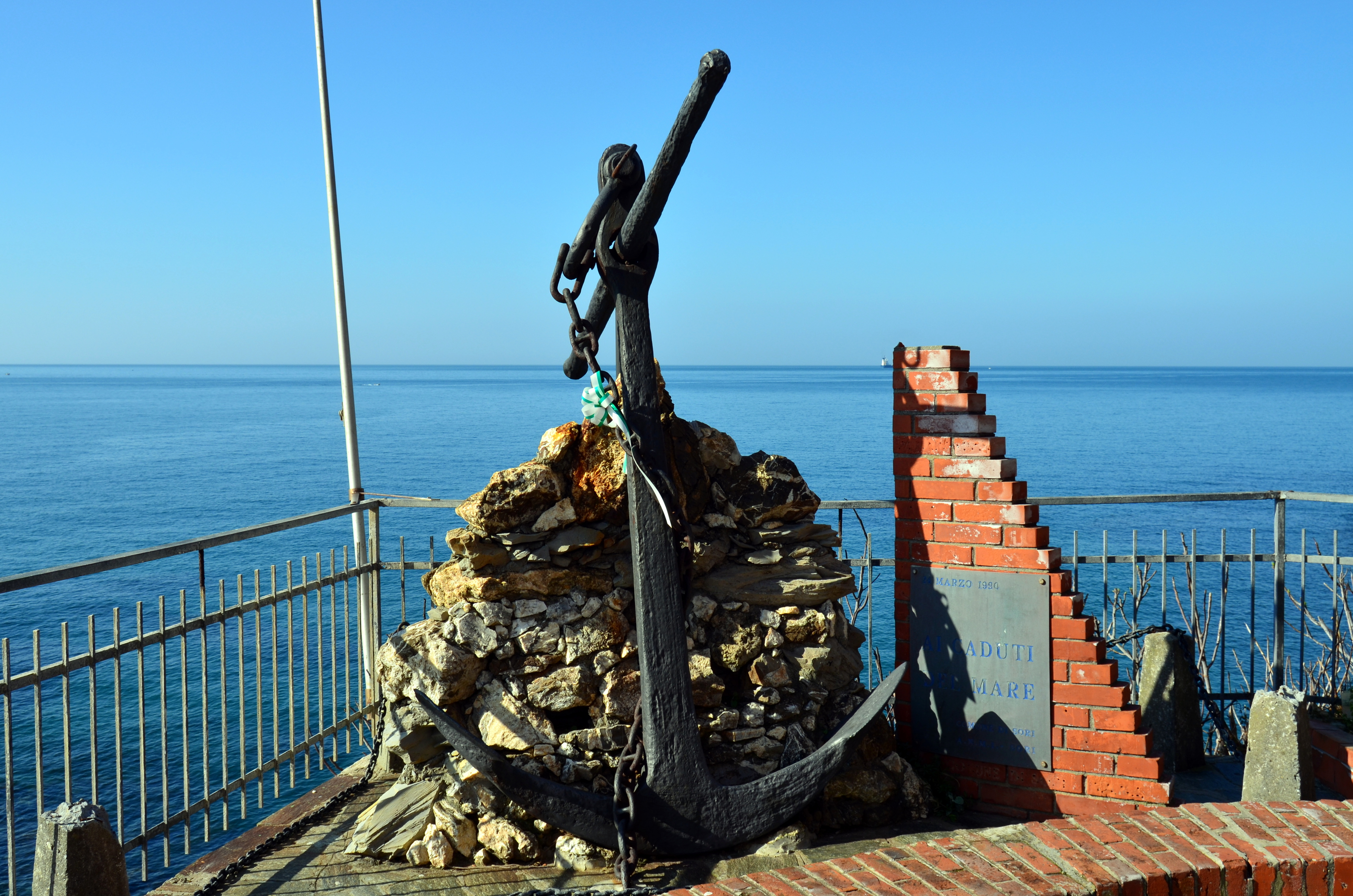 Monumento ai caduti del mare, Sori, Liguria, Italia